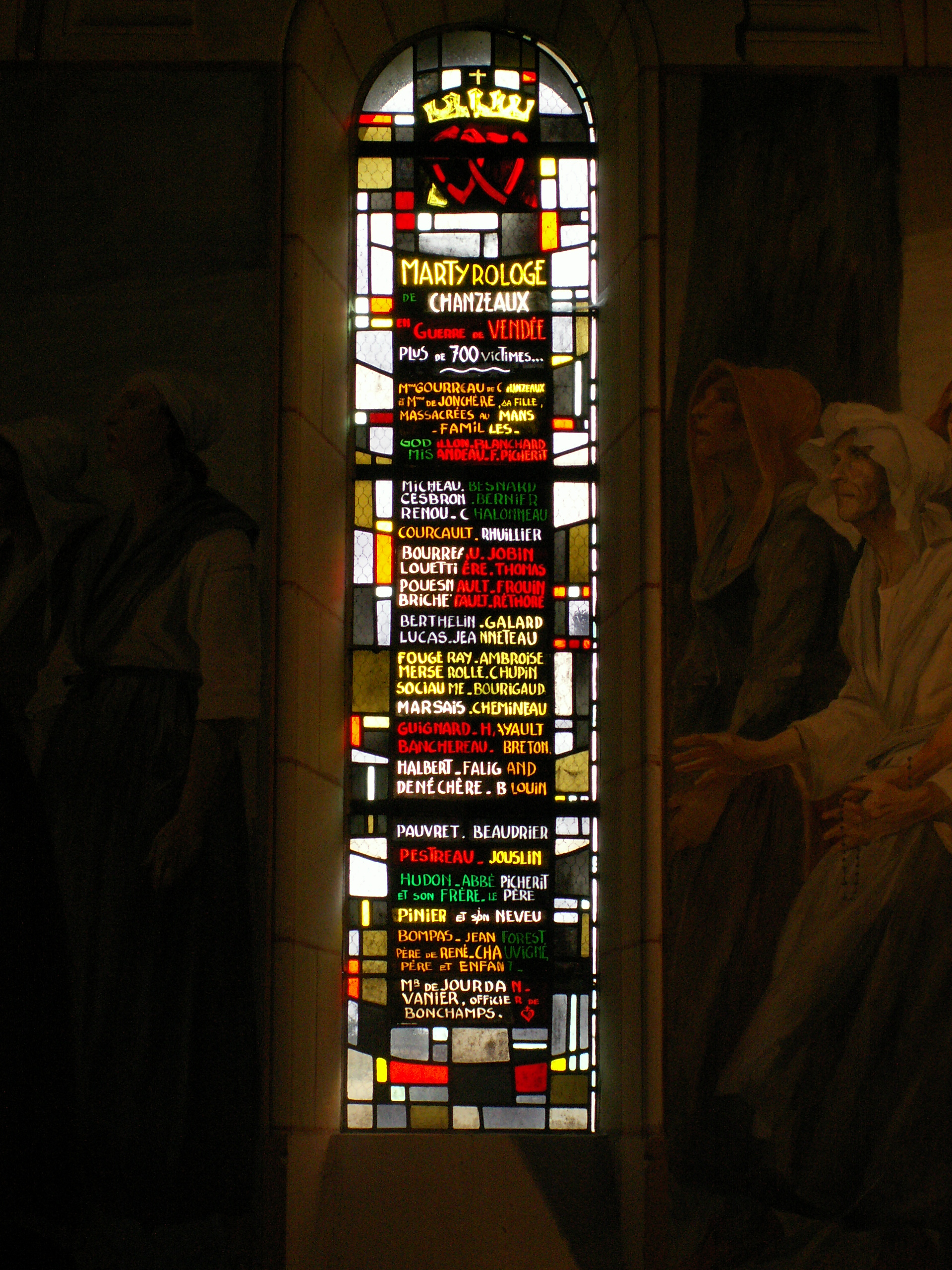 Martyrologe de la paroisse de Chanzeaux oeuvre personnelle 18/03/2007 Jean-Michel Robineau